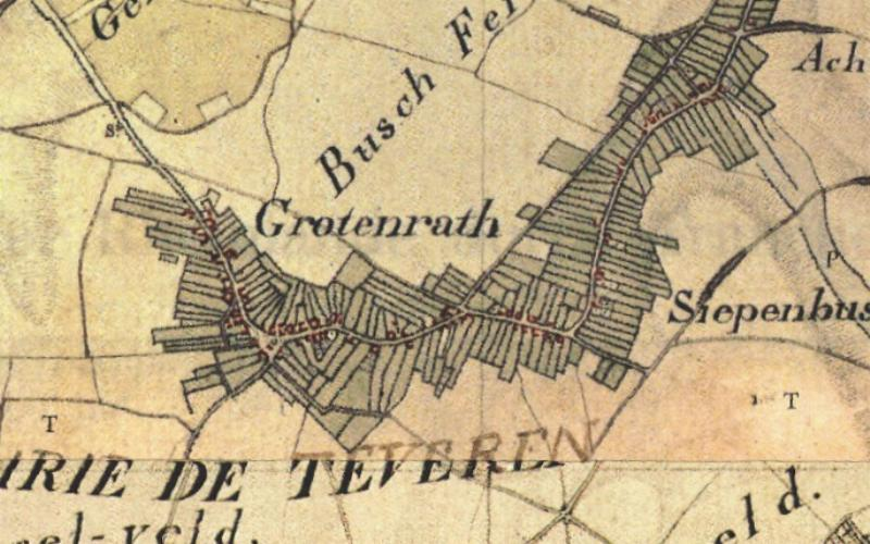 Kartenaufnahme der Rheinlande 1803-1820